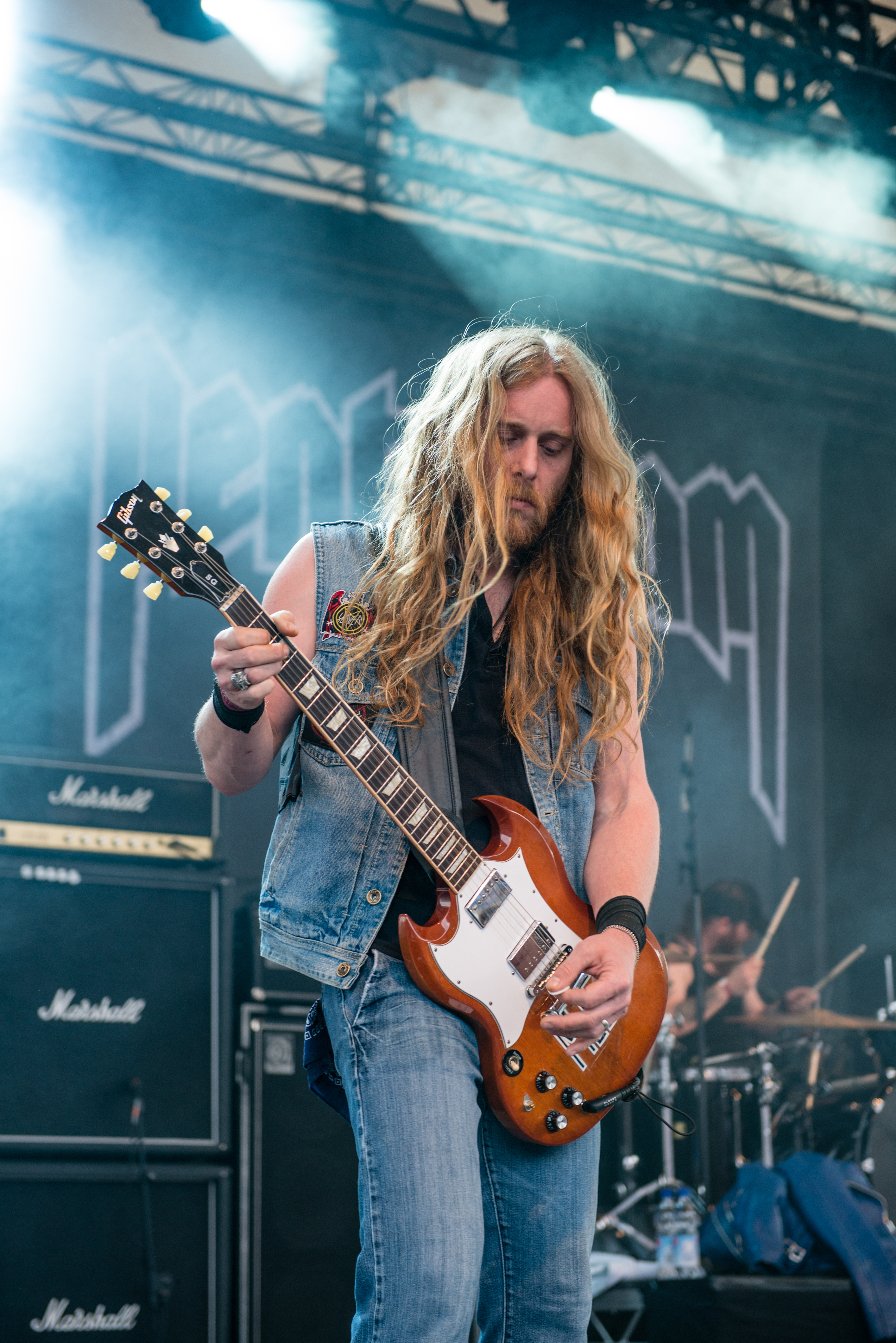 'Rock Hard Festival 2015; Gelsenkirchen Amphitheater': 'Pentagram'